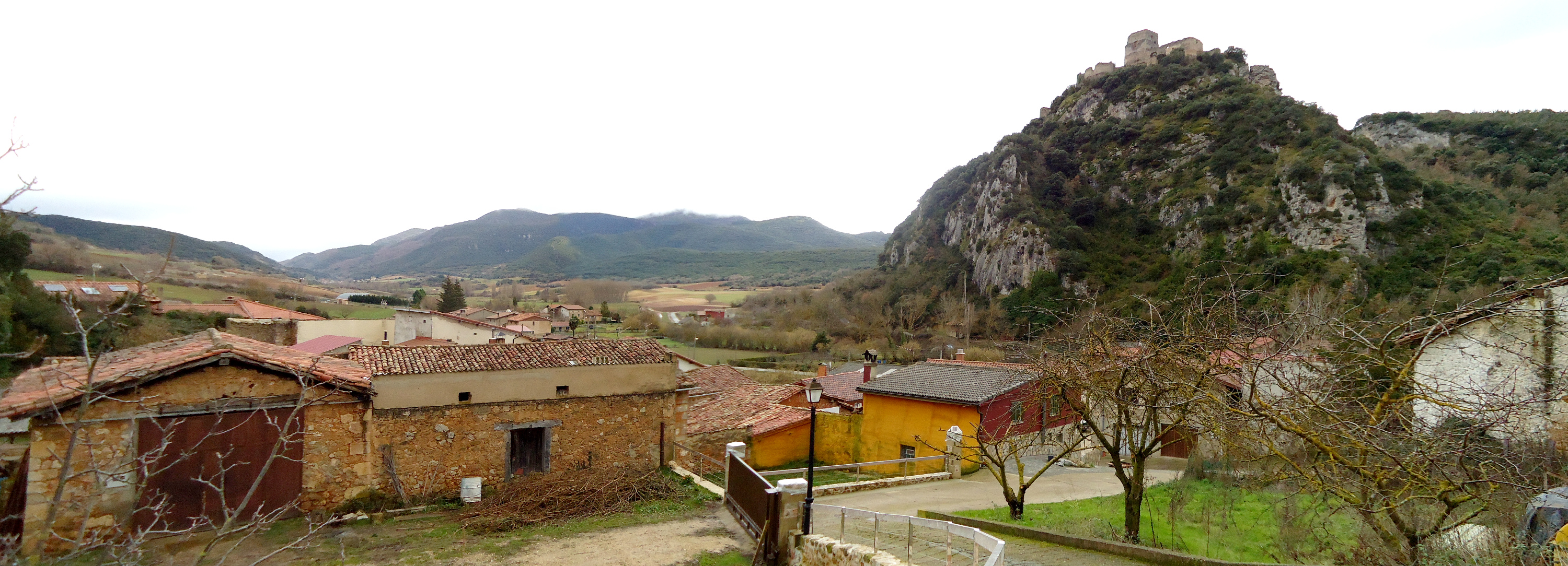 Ocioko herrian eta haren gainean dagoen Lanosko gaztelua